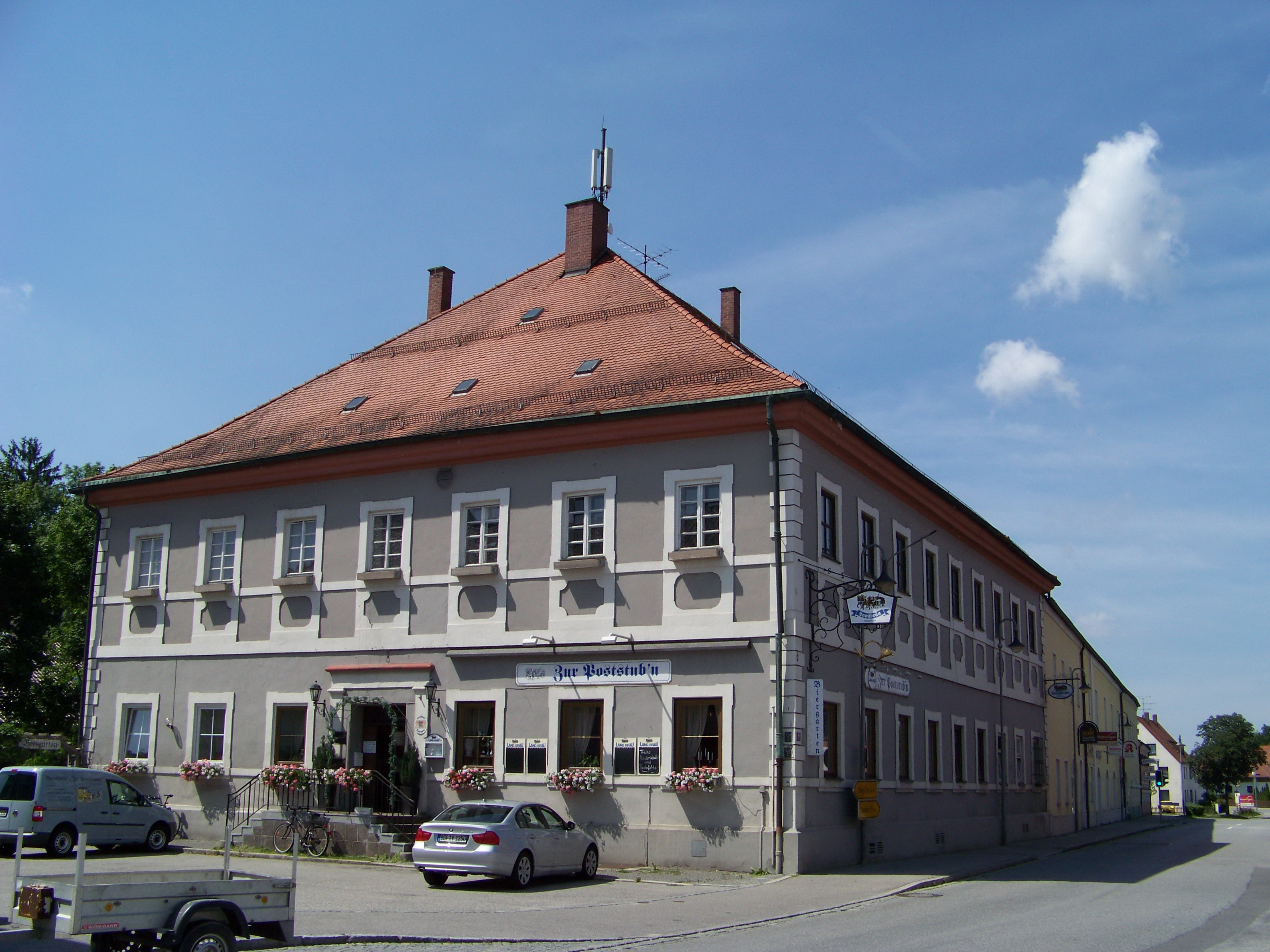 Wörth an der Isar. Postgasthof, zweigeschossiger Walmdachbau mit Putzgliederung, 2. Hälfte 18. Jahrhundert